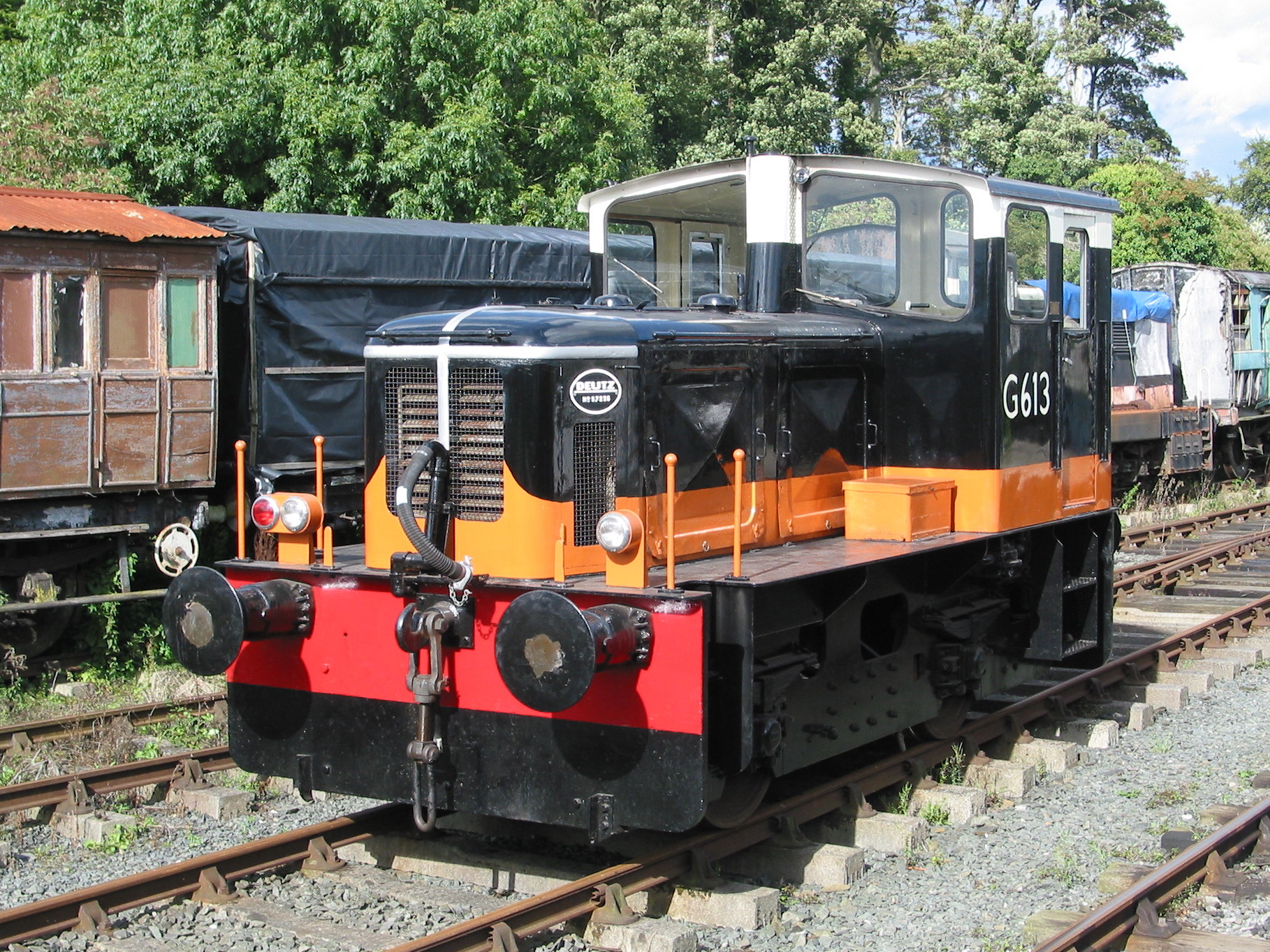 G613 (Downpatrick & Co Down Railway)